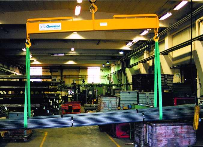 Zawiesie jednobelkowe. Autor: Ssawka Grafika udostępniona na licencji GFDL